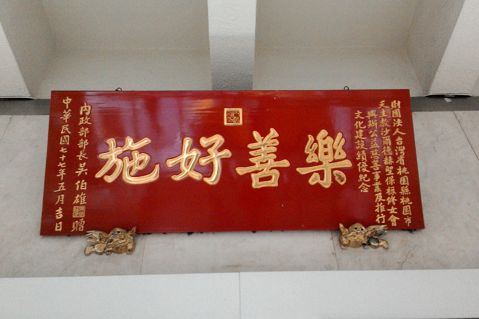 聖保祿醫院內政部部長吳伯雄所贈匾額,桃園市桃園區大樹林次分區福安里